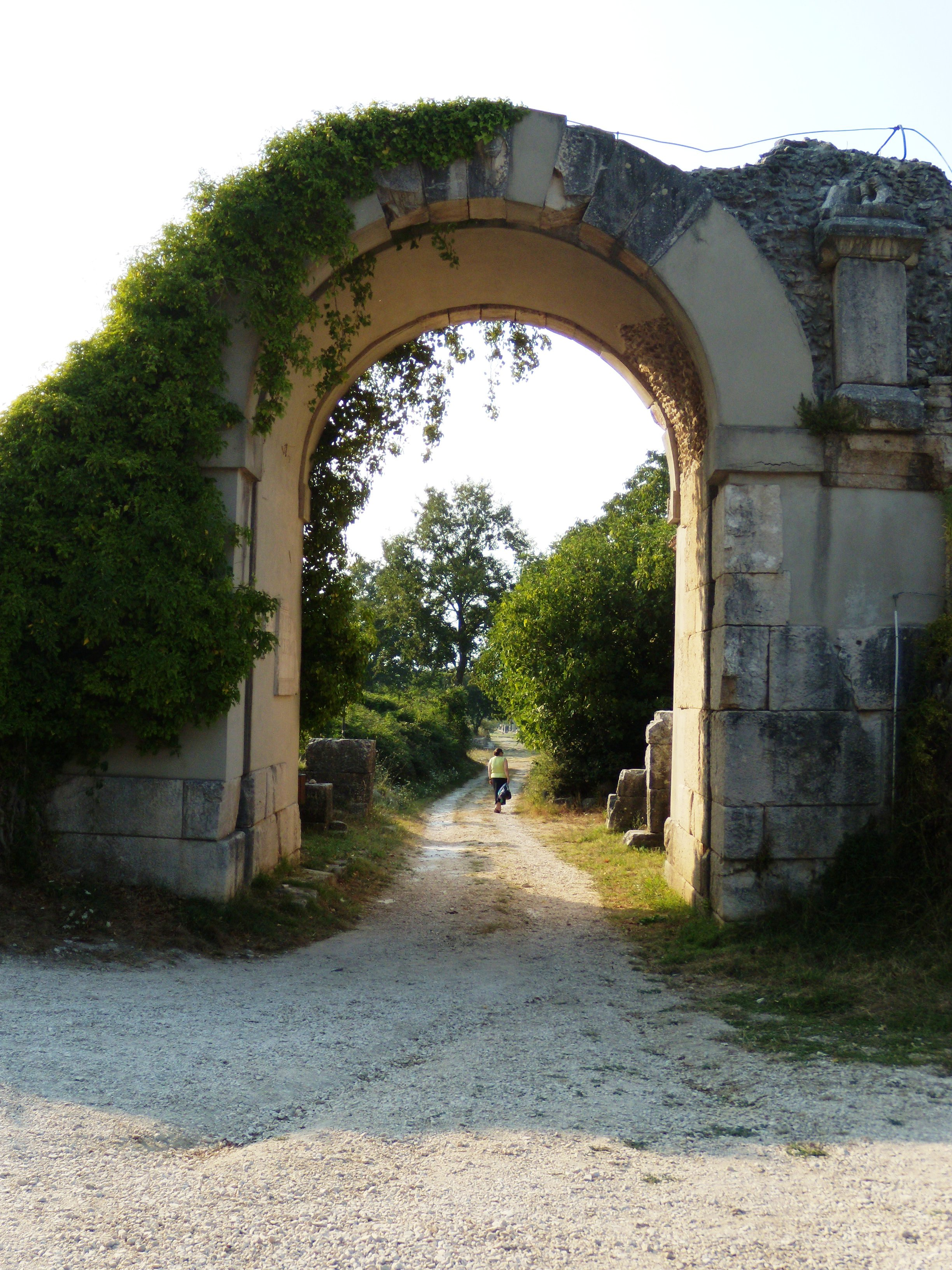 Scavi archeologici di Saepinum (Italy): Porta Benevento (epoca romana).